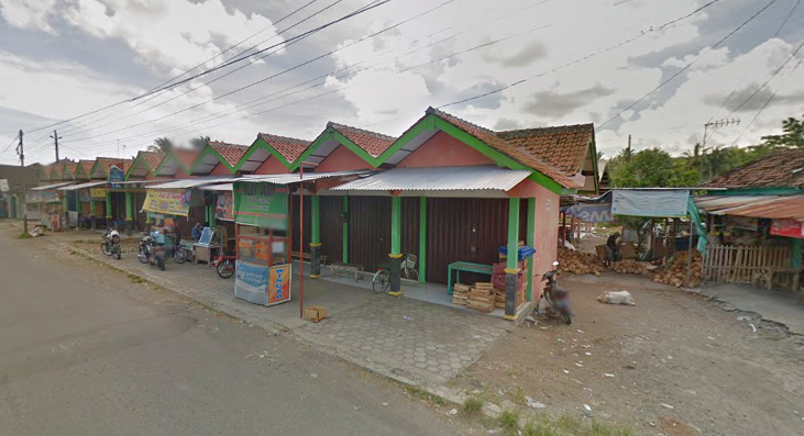 Pasar Cikli Kulur yang terletak di Pedukuhan Polodadi, Desa Kulur